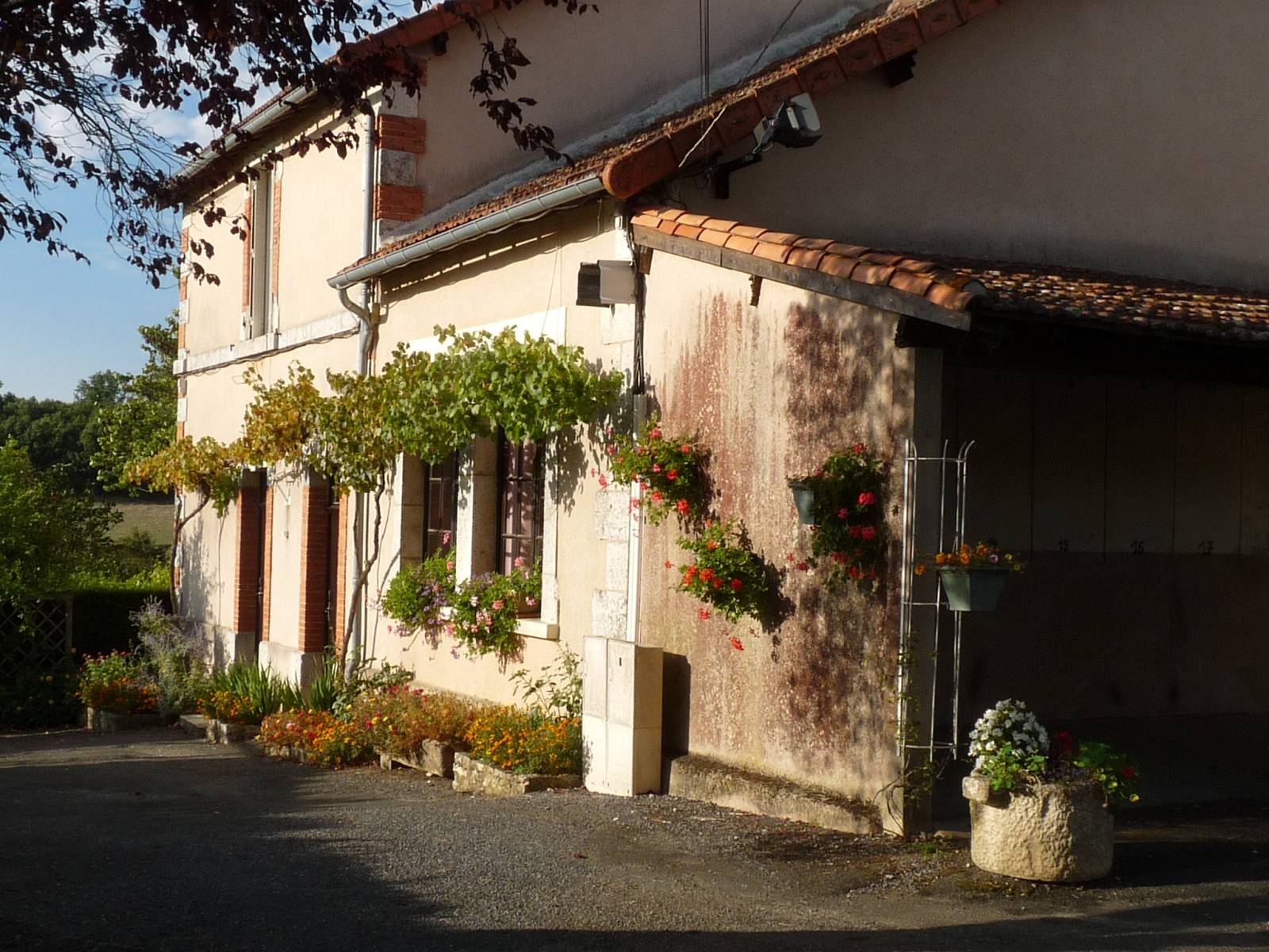 mairie de St-Sulpice-de-Ruffec, Charente, France